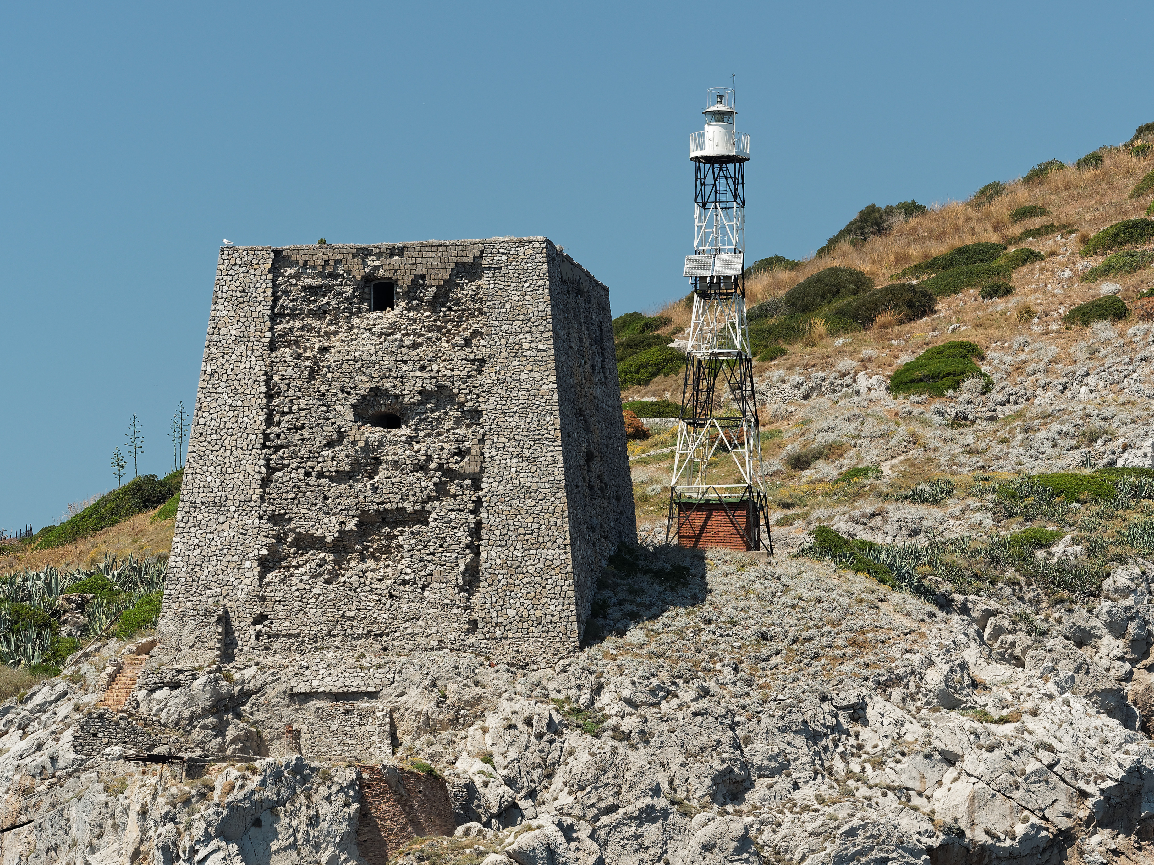 Das Leuchtfeuer Faro Punta Capanella auf der Westseite der Amalfi-Halbinsel, aus westlicher Richtung, Kampanien, Italien.